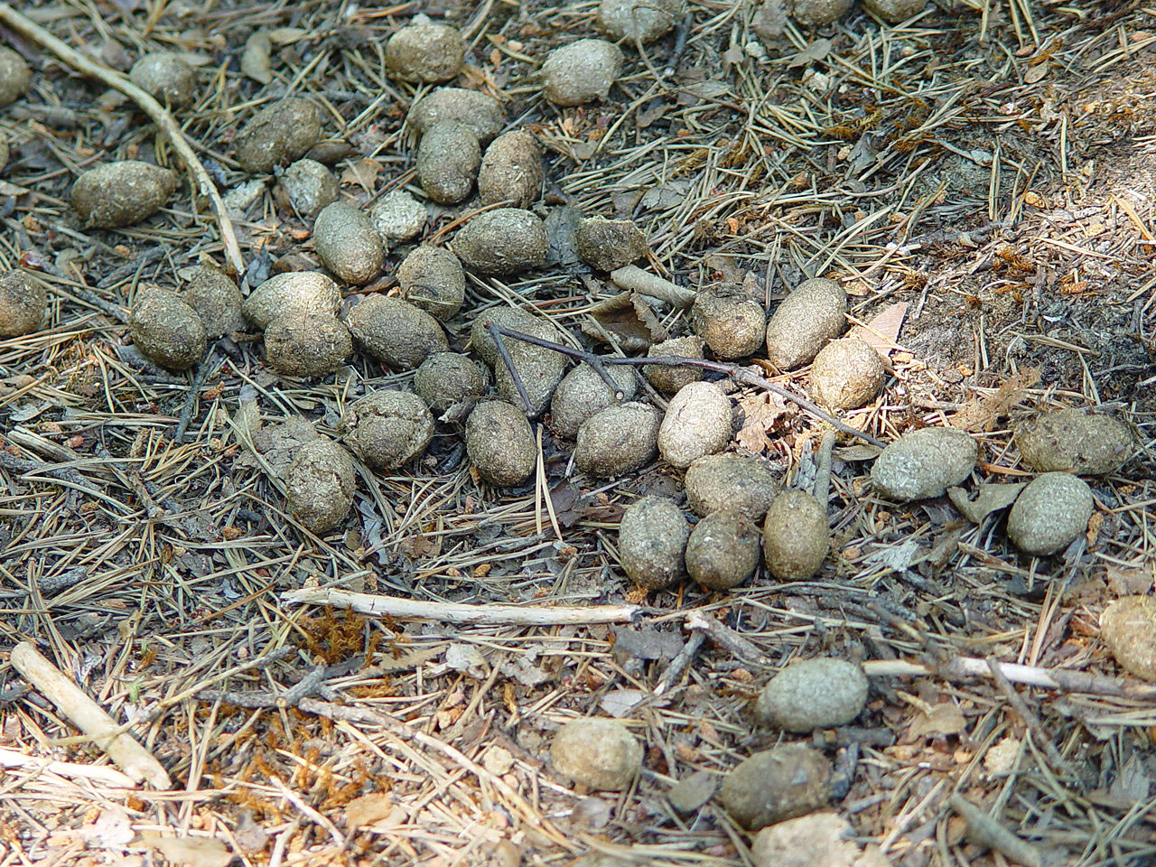 Elch Kot, aufgenommen im Junkerdalen (Norwegen) - Elk excrement